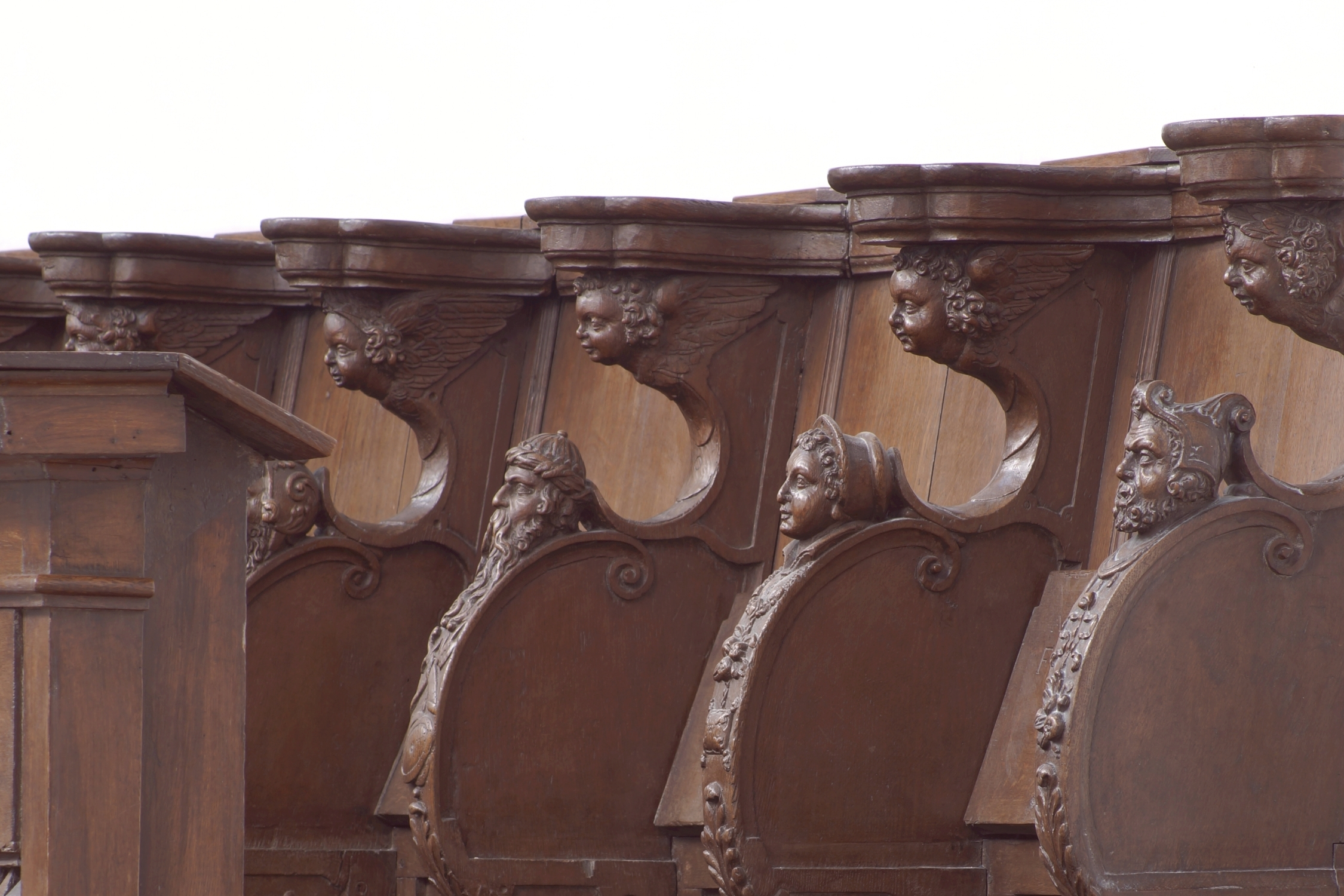 Collegiale kerk Sint-Begga (Andenne) - Detail van het koorgestoelte